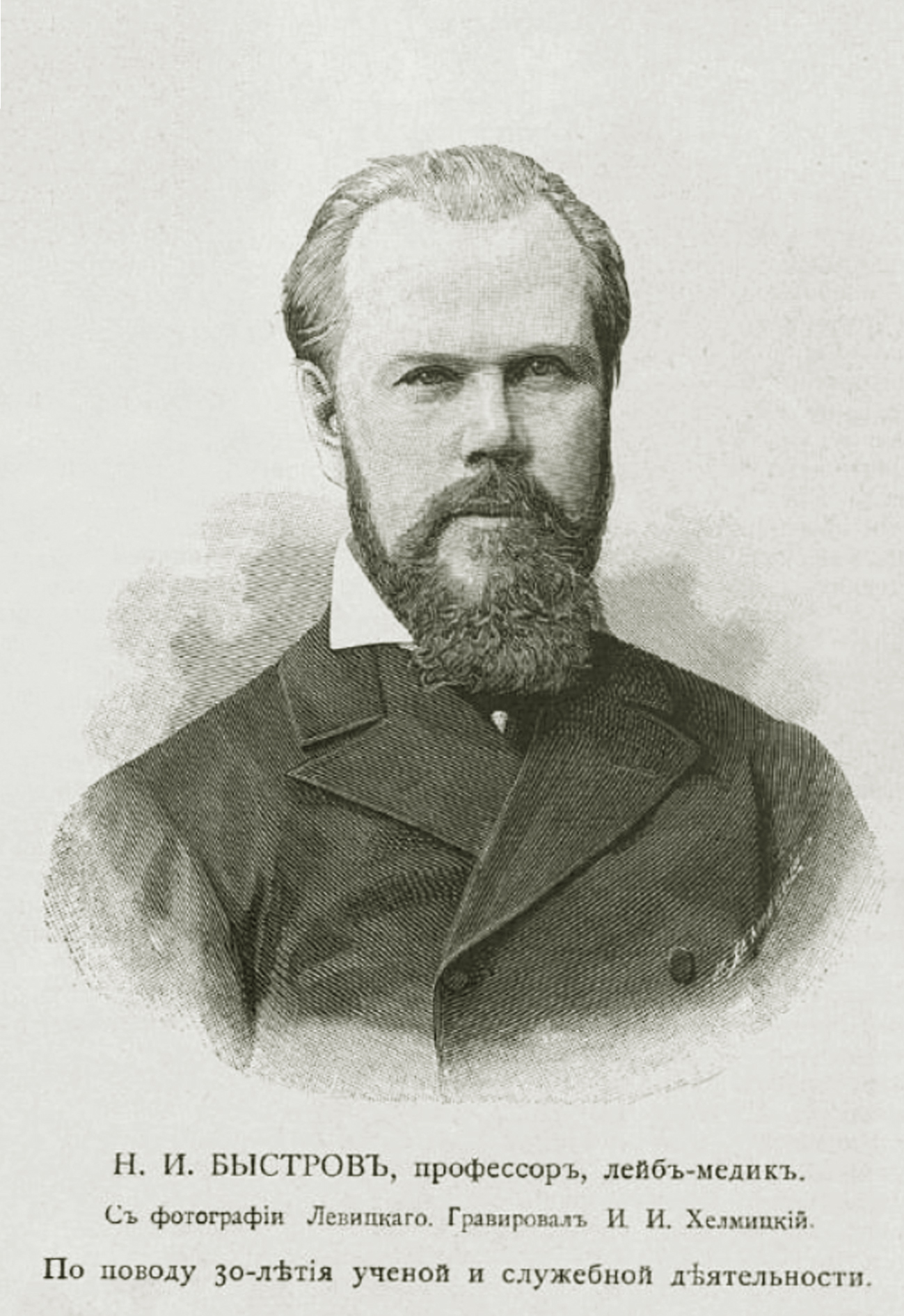 Портрет профессора ВМА Николая Ивановича Быстрова из журнала "Всемирная иллюстрация" от 26.10.1896 г. № 1448